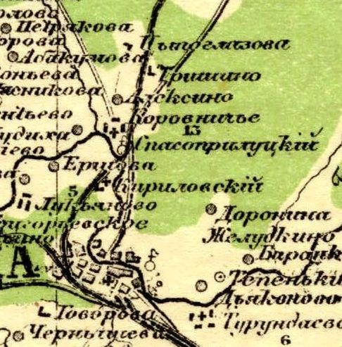 Фрагмент карты Вологодской губернии. Печать 1920 года